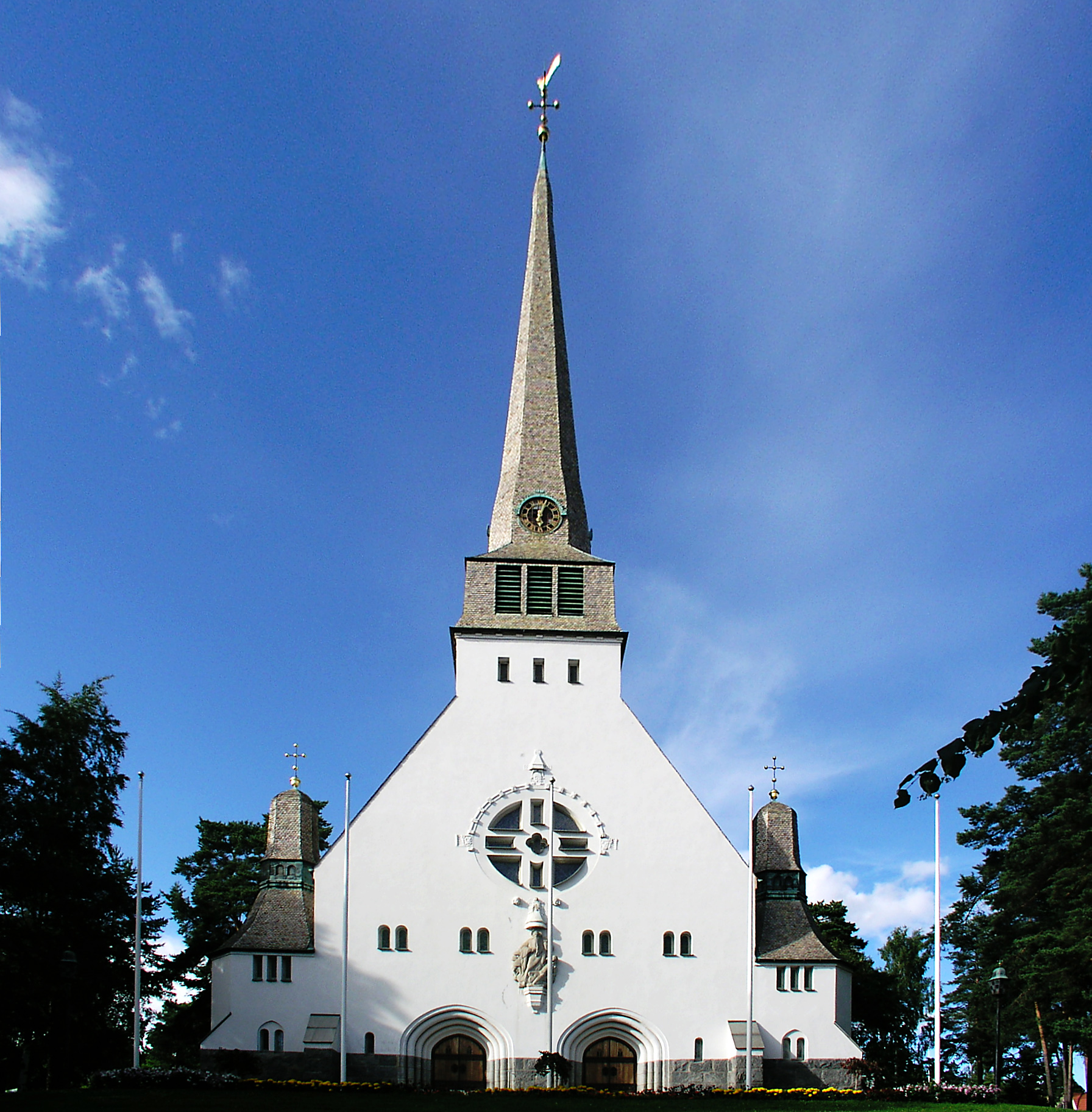 Trefaldighetskyrkan, Arvika, Karlstads stift, Värmland, Sverige. Vy.